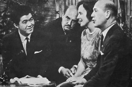 Bilden är tagen den 10 oktober 1964 då sångaren Kyu Sakamoto gästade Hylands hörna som sändes live från Tokyo. Den svensk-japanske företagsledaren Taro Gadelius syns i bildens mitt.